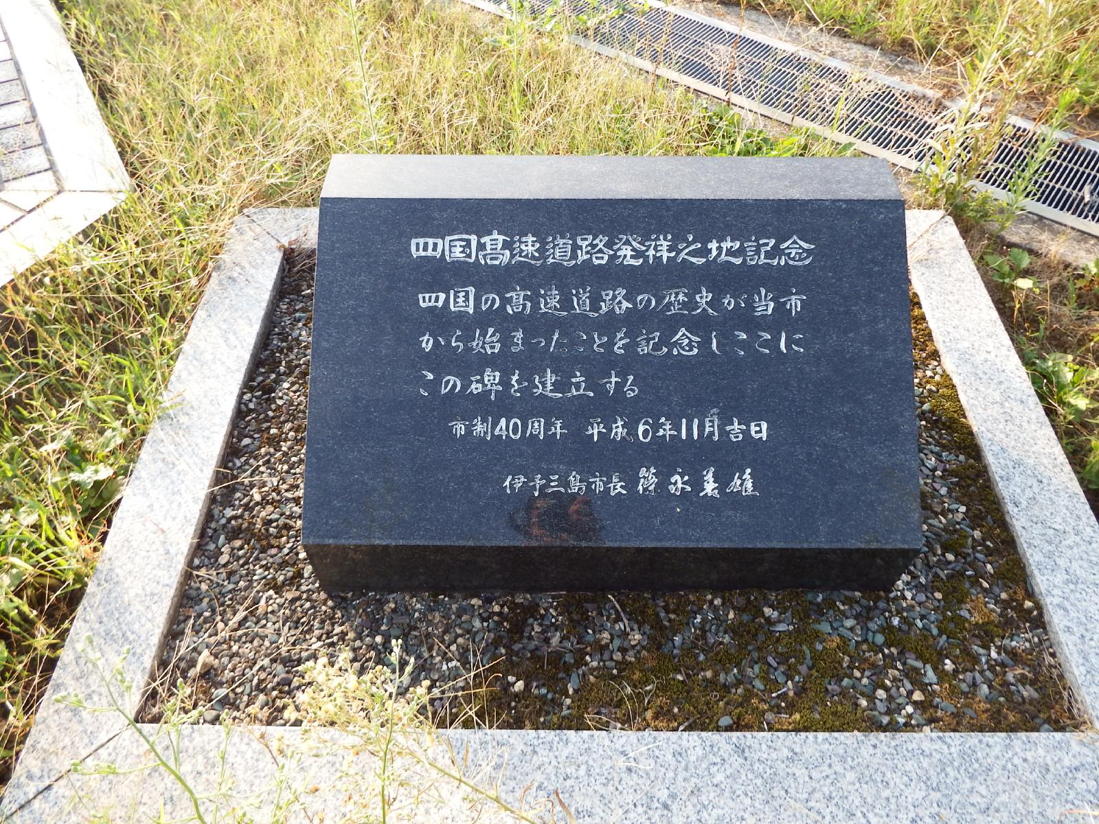 四国高速道路発祥の碑